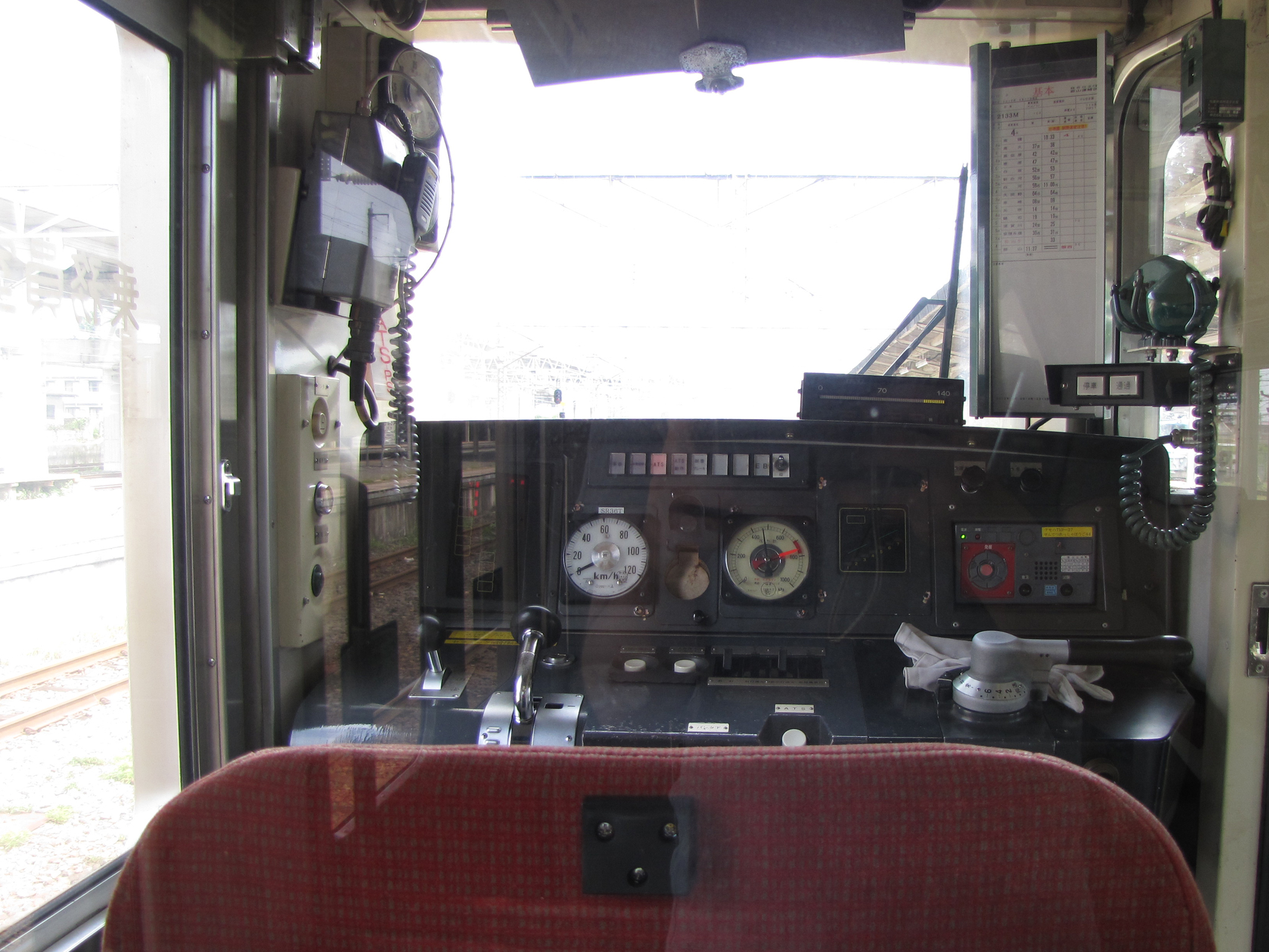 JR東日本 719系電車 0番台 運転台（クモハ719-27）